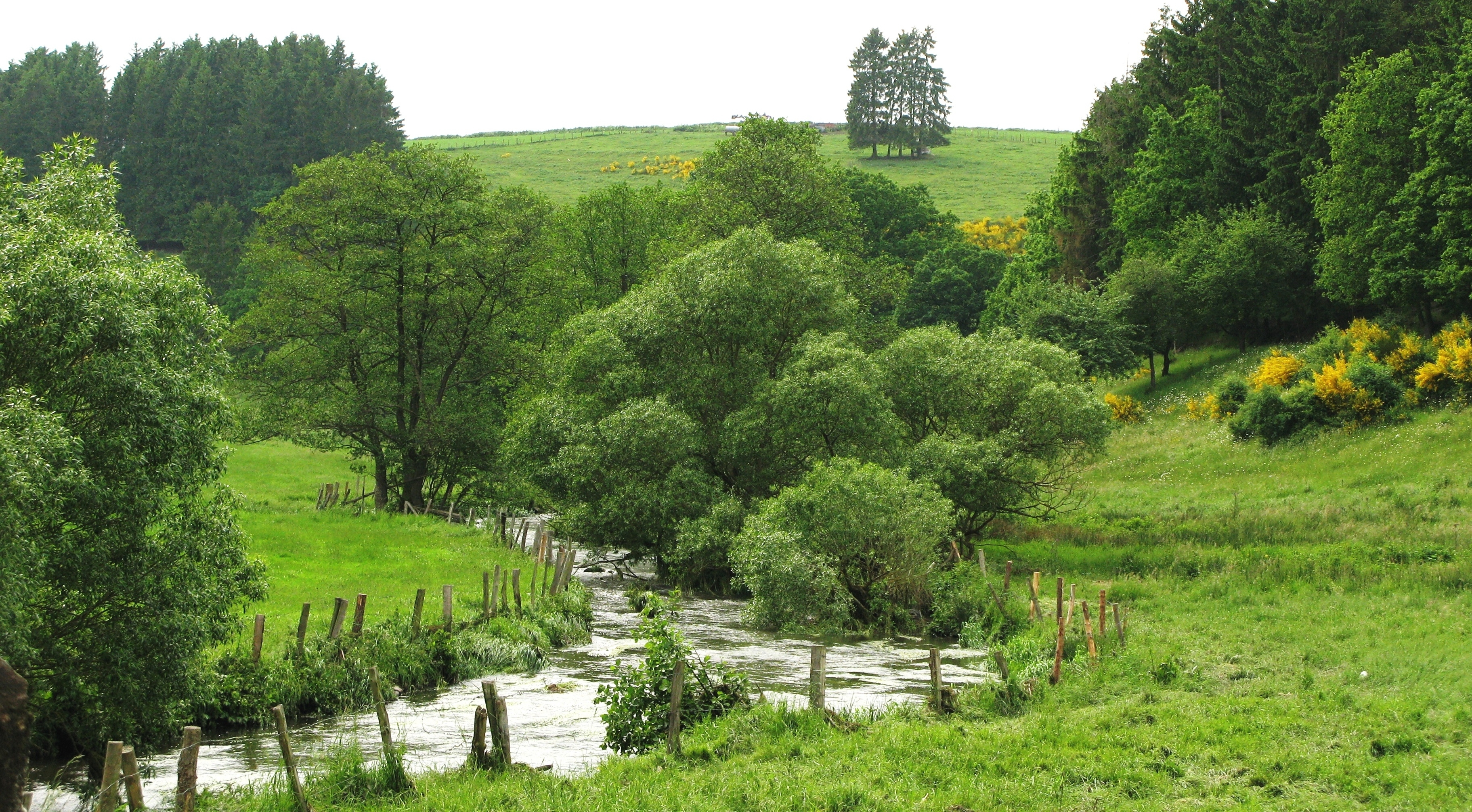 D'Wolz am Dall tëscht Nidderwampech an der Statioun Schëmpech-Wampech.